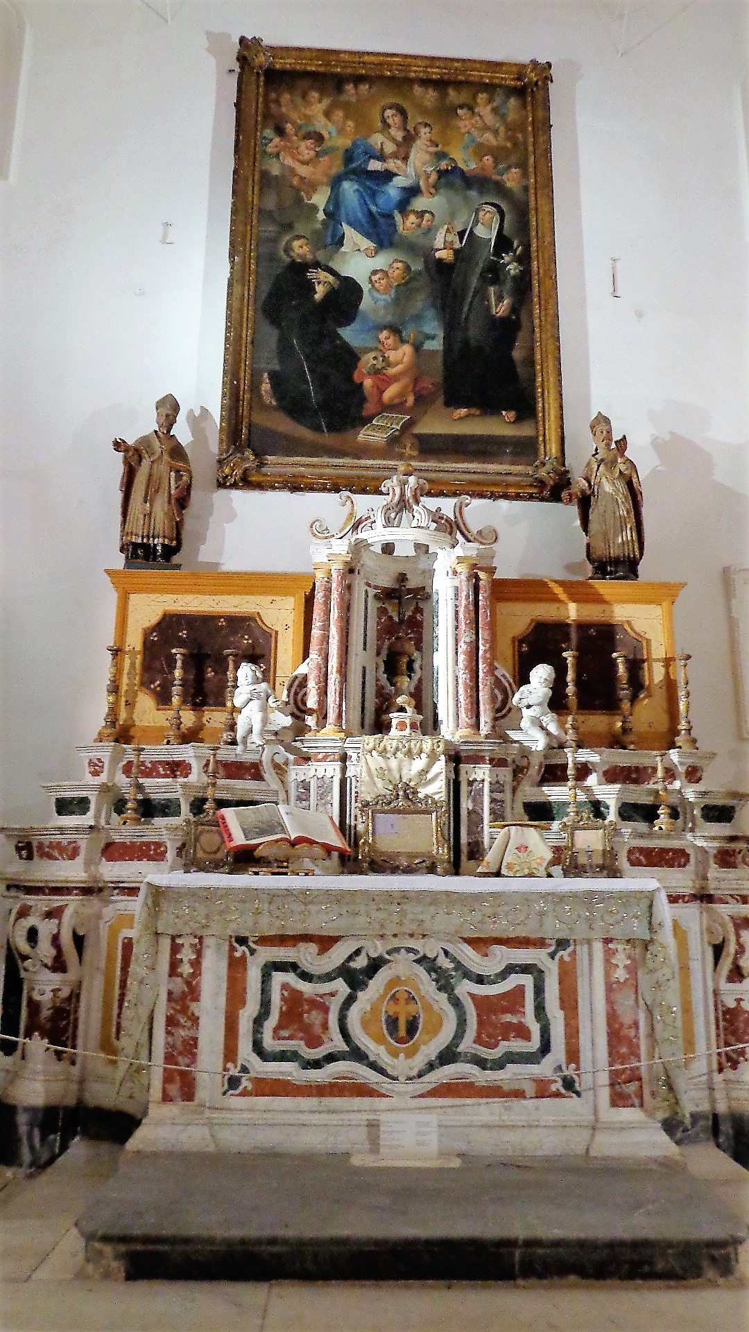 Altare maggiore di Santa Maria degli Angeli, ricostruzione con dipinto raffigurante la Madonna degli Angeli ritratta tra San Francesco d'Assisi e Santa Chiara.